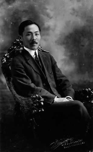 Young Dosan Chang-ho Ahn in Los Angeles